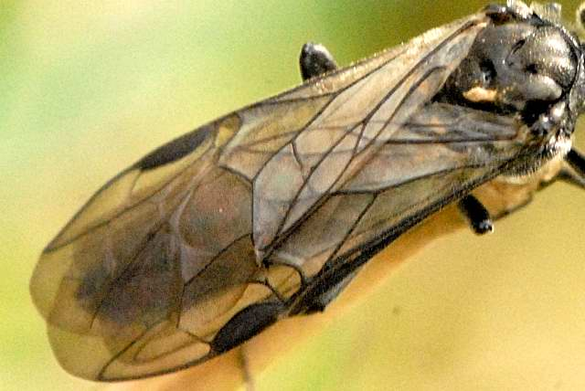 Dolerus nitens from Commanster, Belgian High Ardennes .